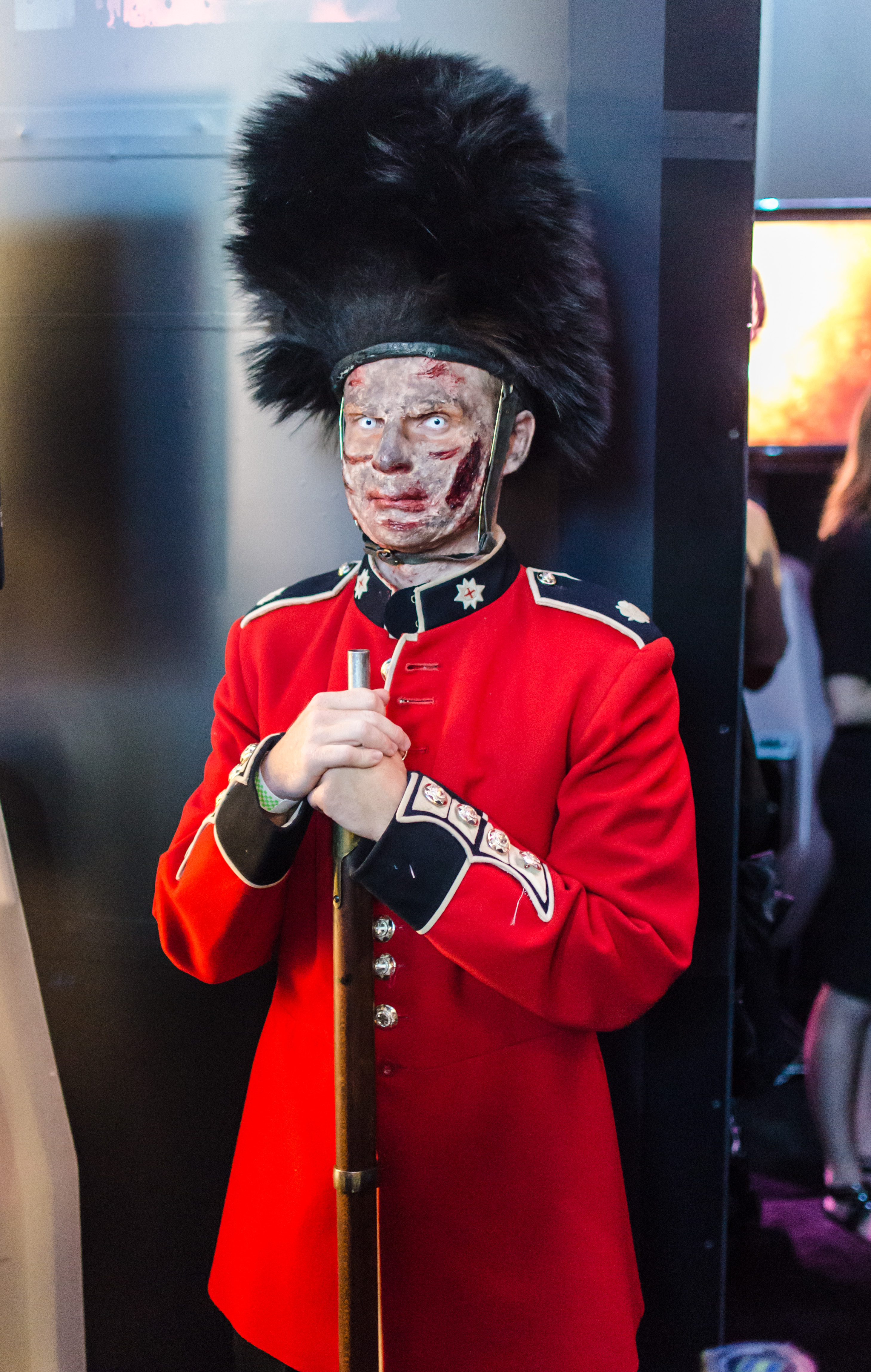 British zombie at E3 2012